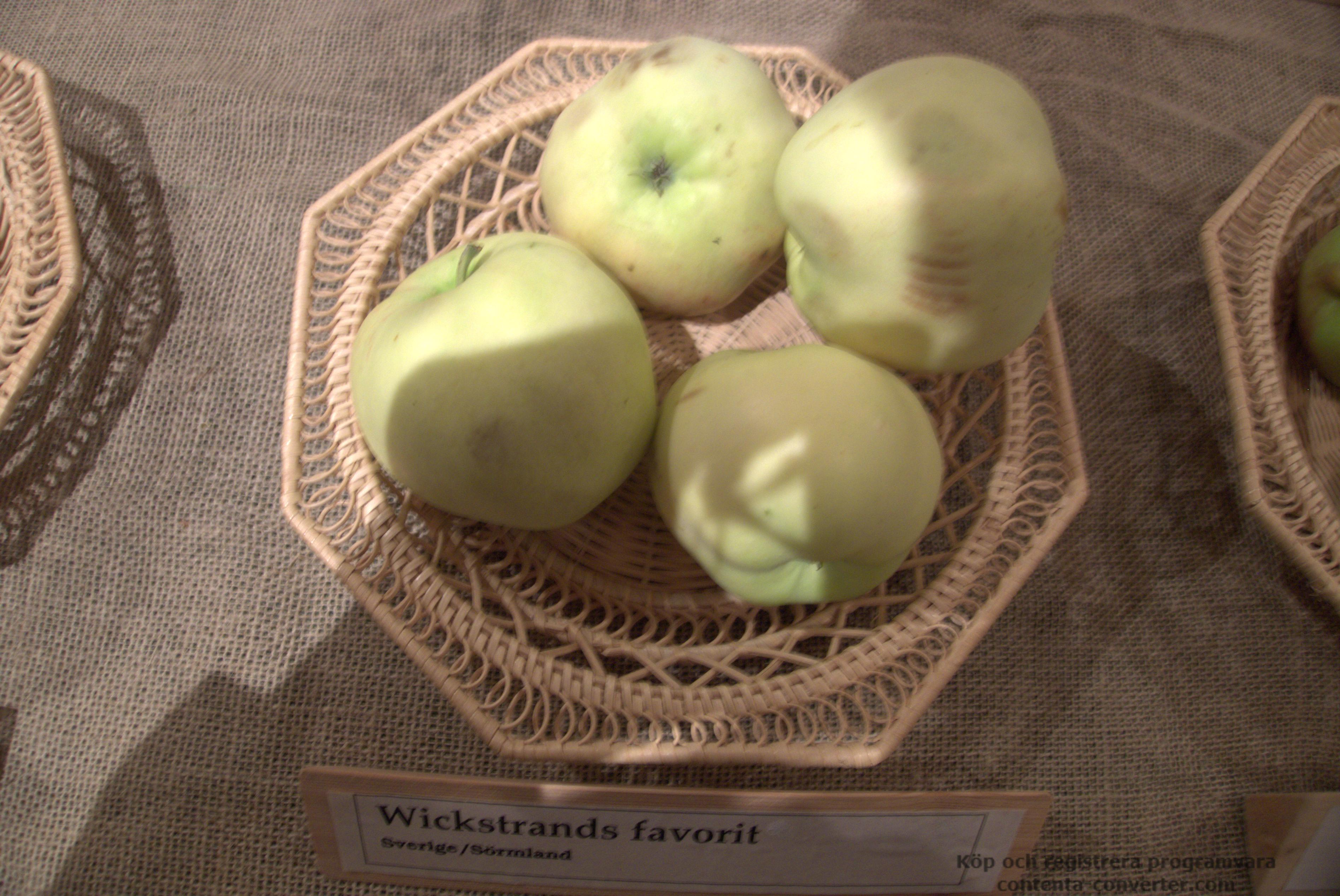 Äpplen av sorten Wickstrands favorit